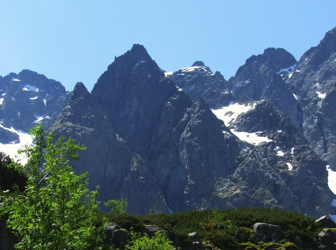 Zasłonista Turnia (Veža železnej brány) w Tatrach Wysokich